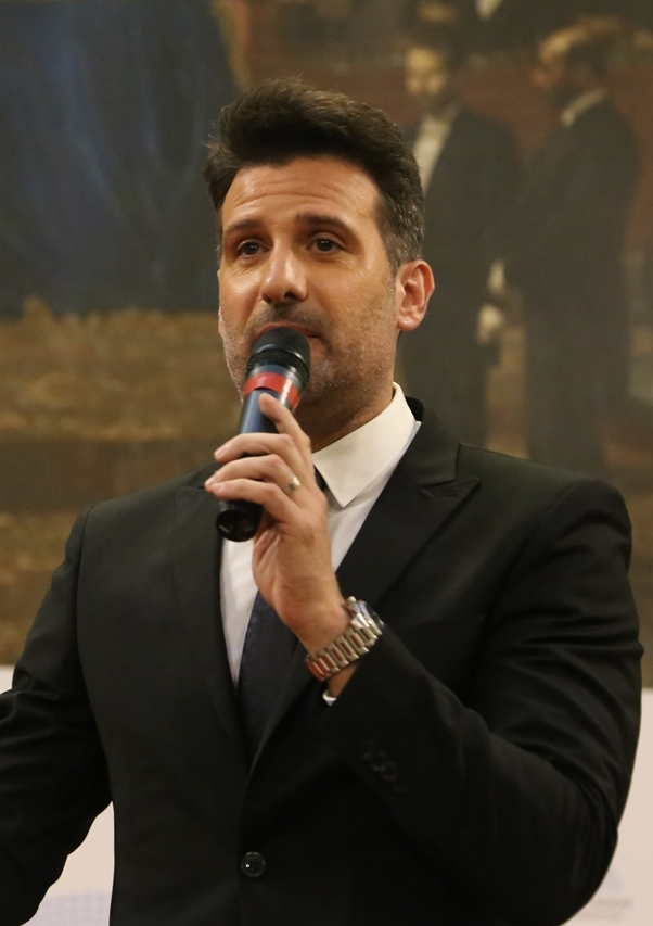 La Cámara de Diputados de la Nación homenajeó al consagrado actor Carlitos Balá en un acto realizado en el Salón de los Pasos Perdidos. Con la presencia del ministro de Cultura de la Nación, Pablo Avelluto, y el diputado nacional Juan Fernando Brügge, se le entregó a Carlitos Balá una Mención de Honor en reconocimiento a su trayectoria artística. El actor José María Listorti, que ofició de conductor del homenaje.